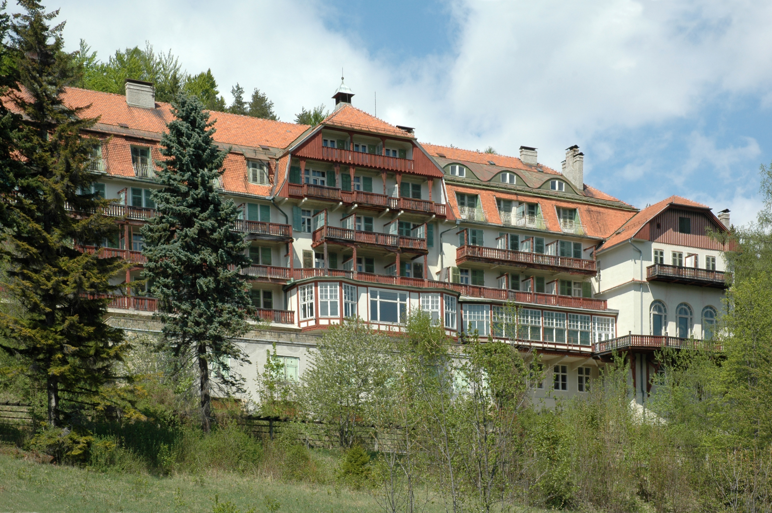 Kurhaus Semmering am Wolfsbergkogel